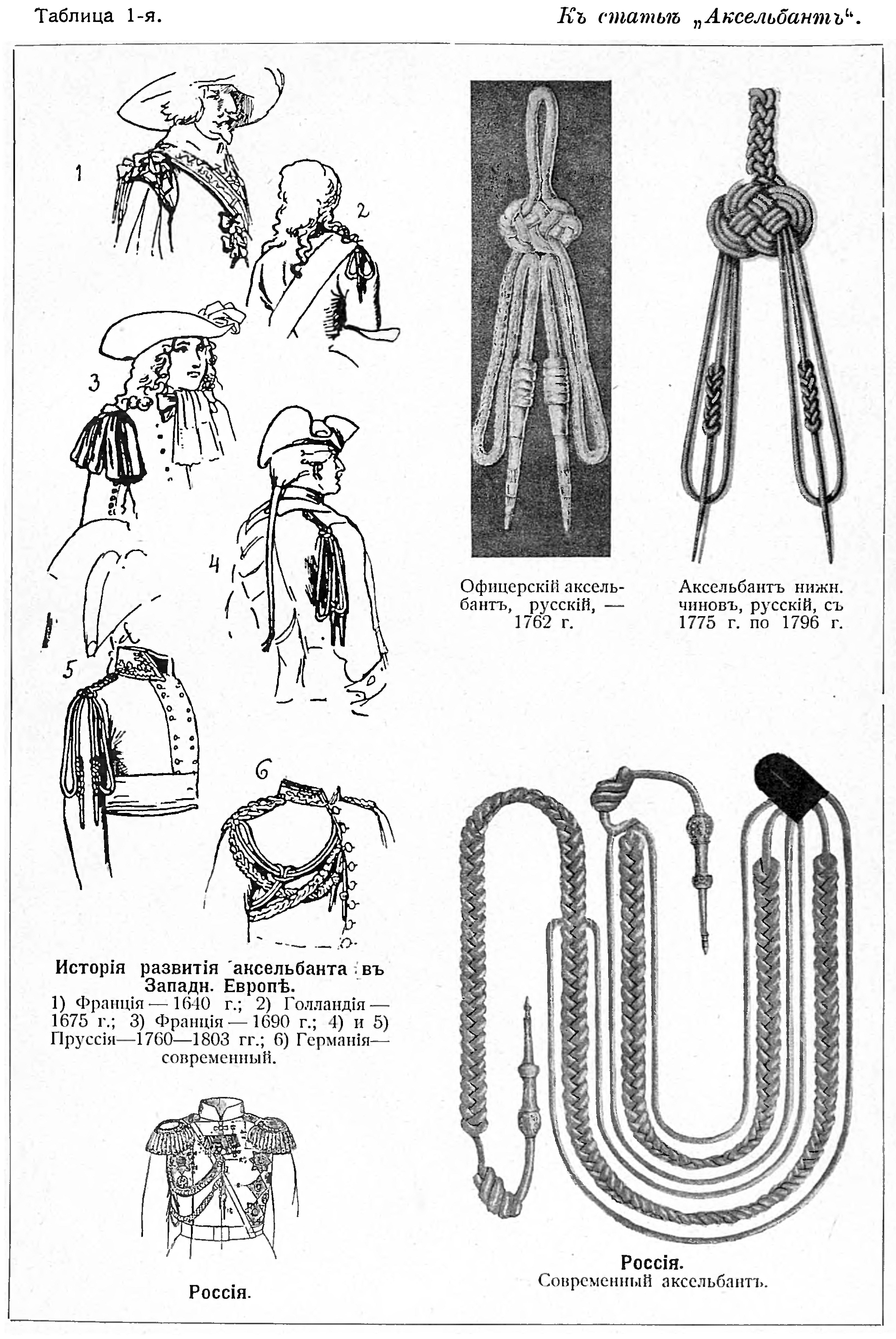 Изображение из «Военной энциклопедии» изданной книгоиздательским товариществом Ивана Дмитриевича Сытина. Санкт-Петербург; 1911—1915 гг. Фото к статье «Аксельбант».